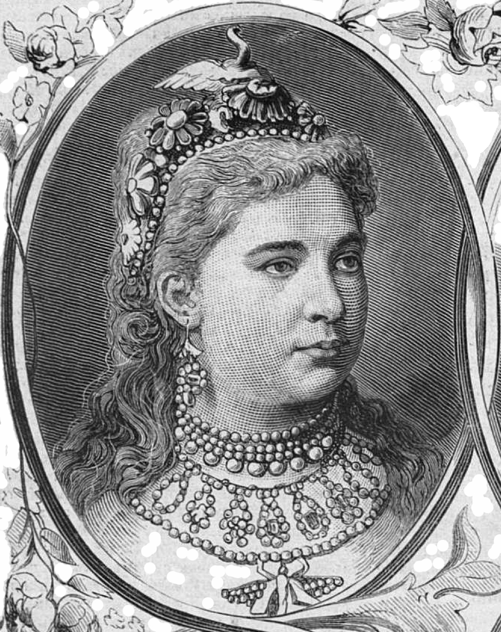 Каменская Мария Даниловна, русская оперная певица, 1870-е годы